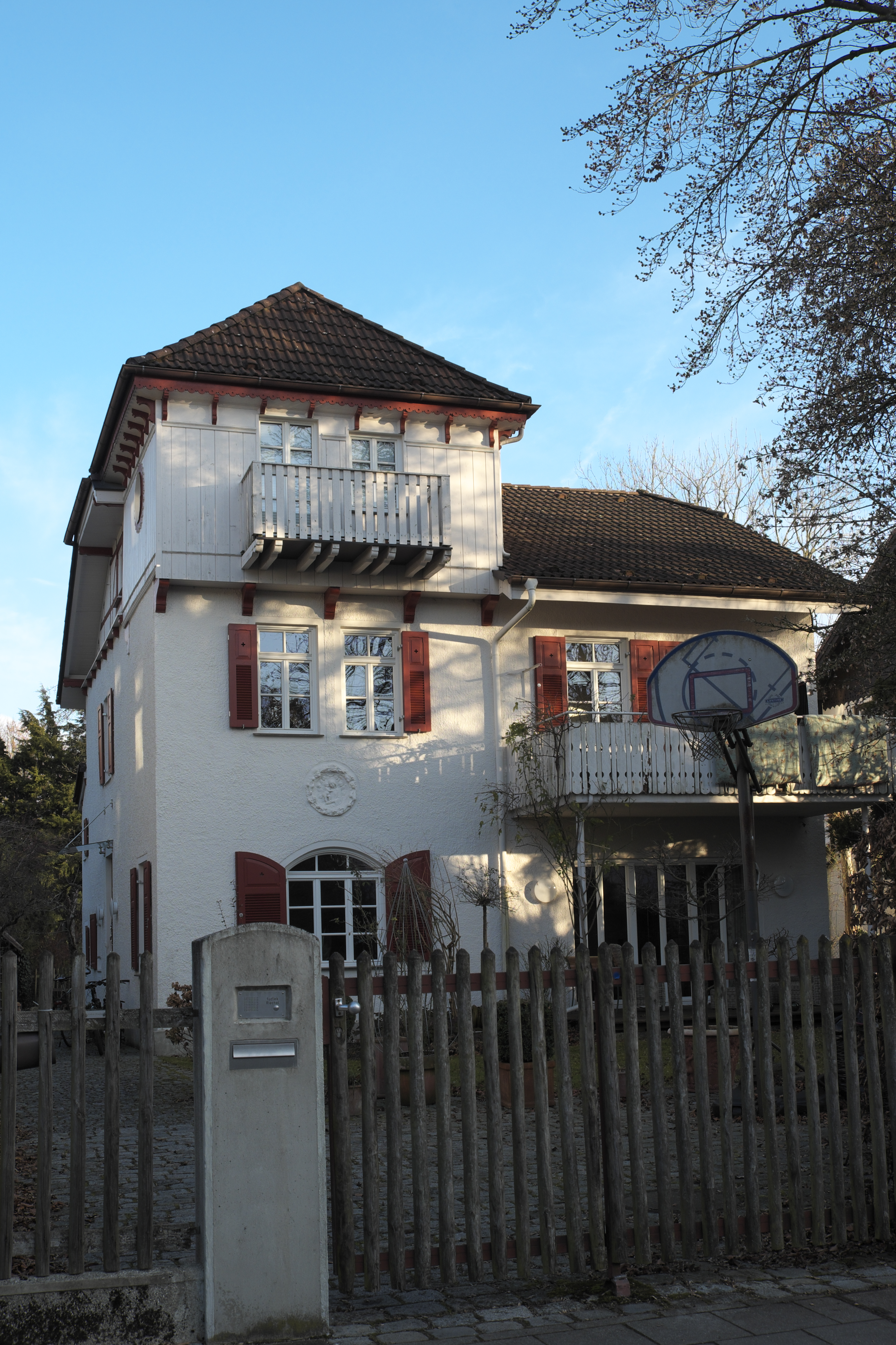 Villa in der Fritz-Reuter-Straße 2a in Pasing im Stadtbezirk Pasing-Obermenzing in München (Bayern/Deutschland), um 1893, aus dem Büro August Exter